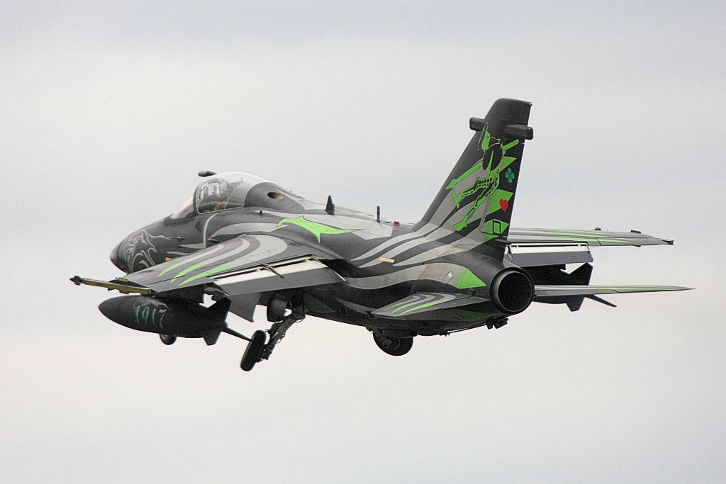 AMX - RIAT 2008